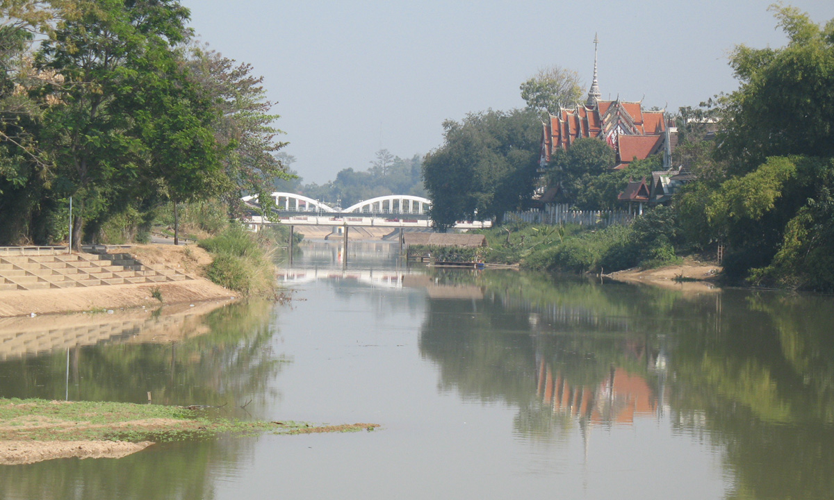 Wang River in Amphoe Mueang Lampang.